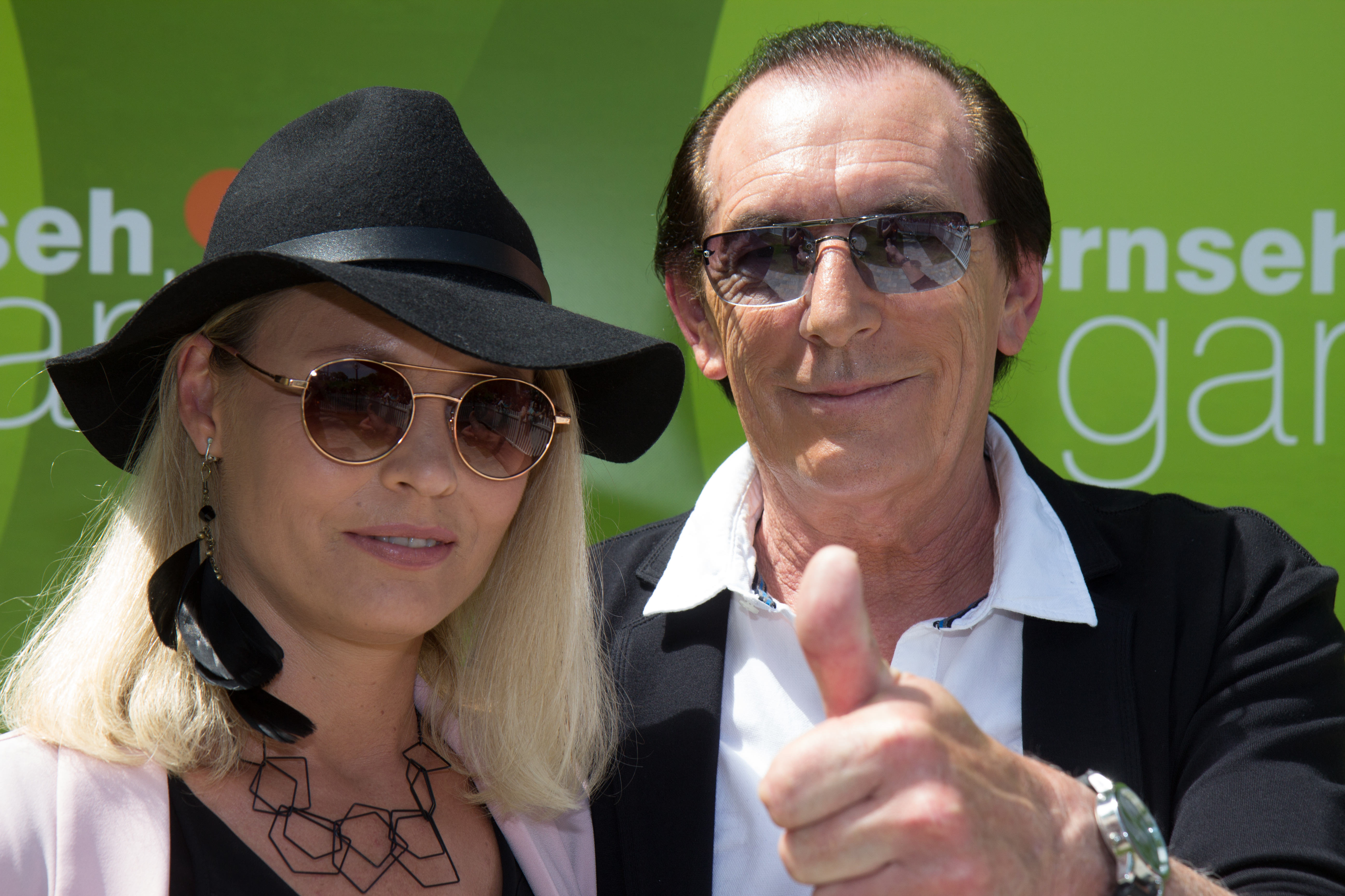 Stefan Zauner und Petra Manuela als Gast beim ZDF-Fernsehgarten am 27. Mai 2018 in Mainz.